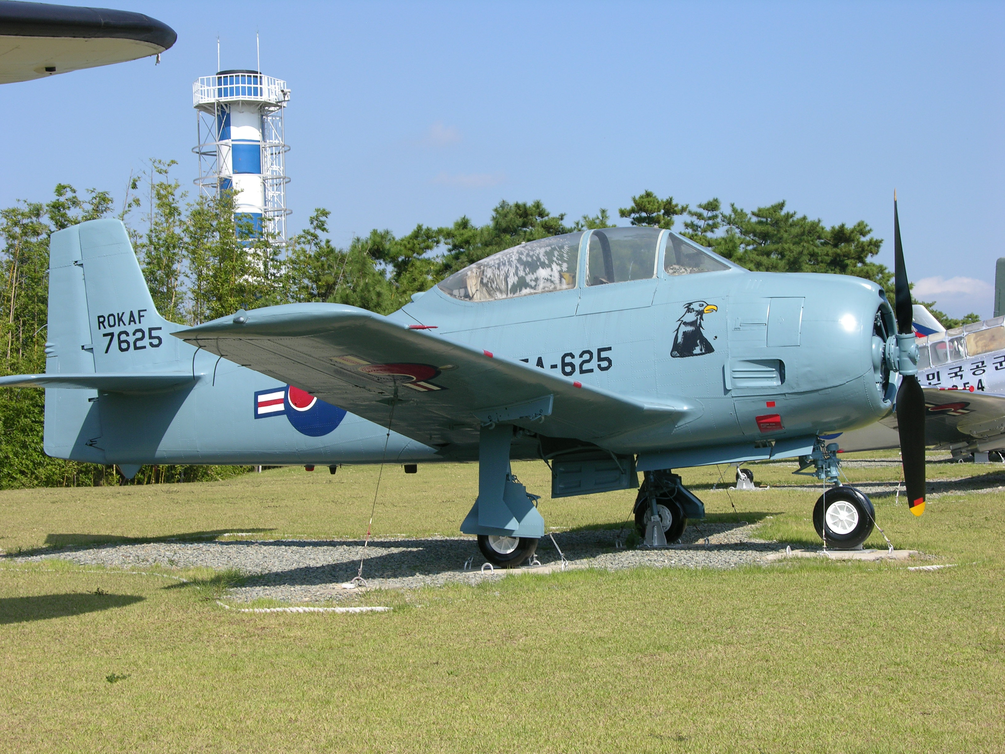 7625 /TA-625 a T-28A Trojan, RoKAF